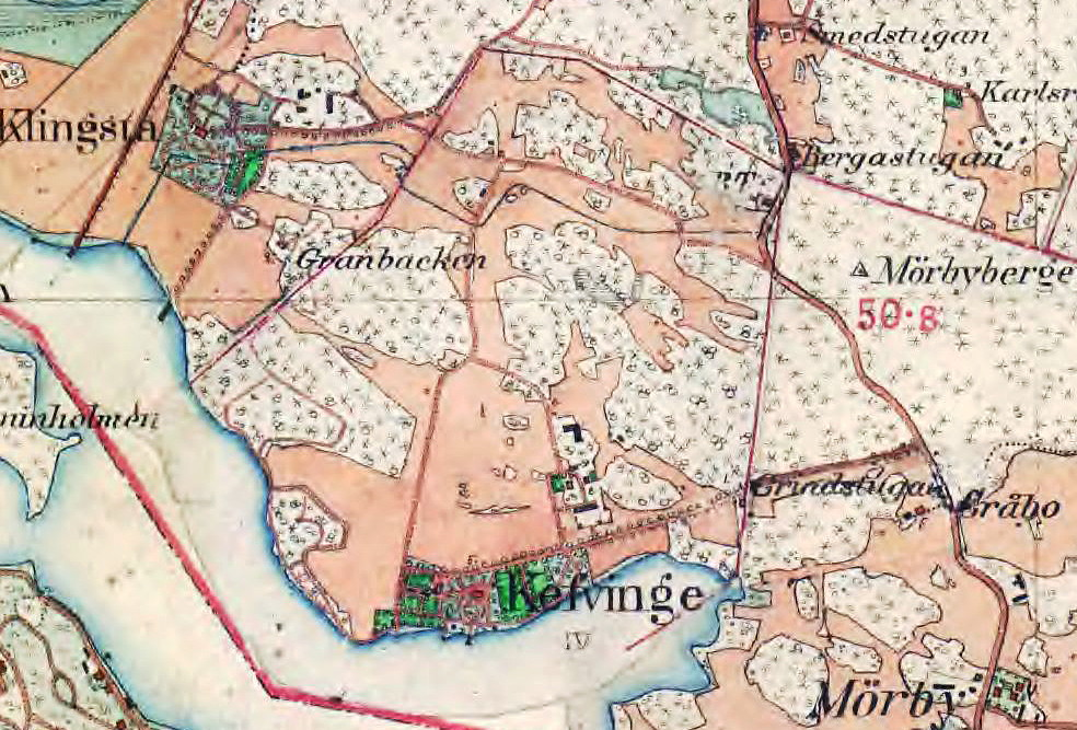 Kevinge gårds ägor